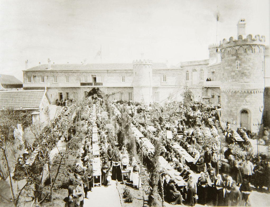 Пасхальное разговение во дворе Сергиевского подворья Императорского Православного Палестинского Общества в Иерусалиме. Фото. Ф.М. Тимона. Конец XIX века